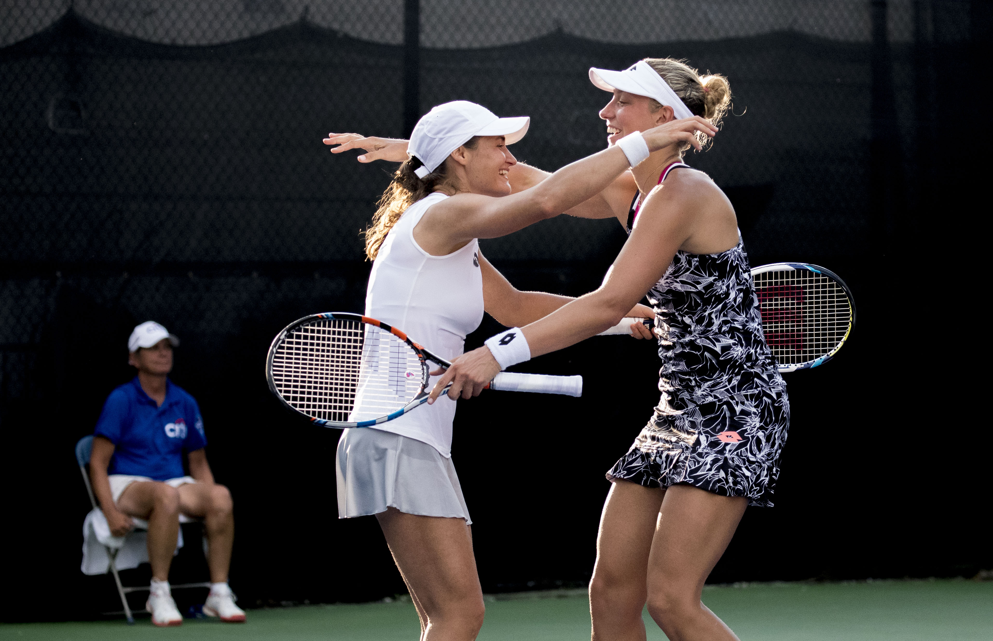 2016 Citi Open